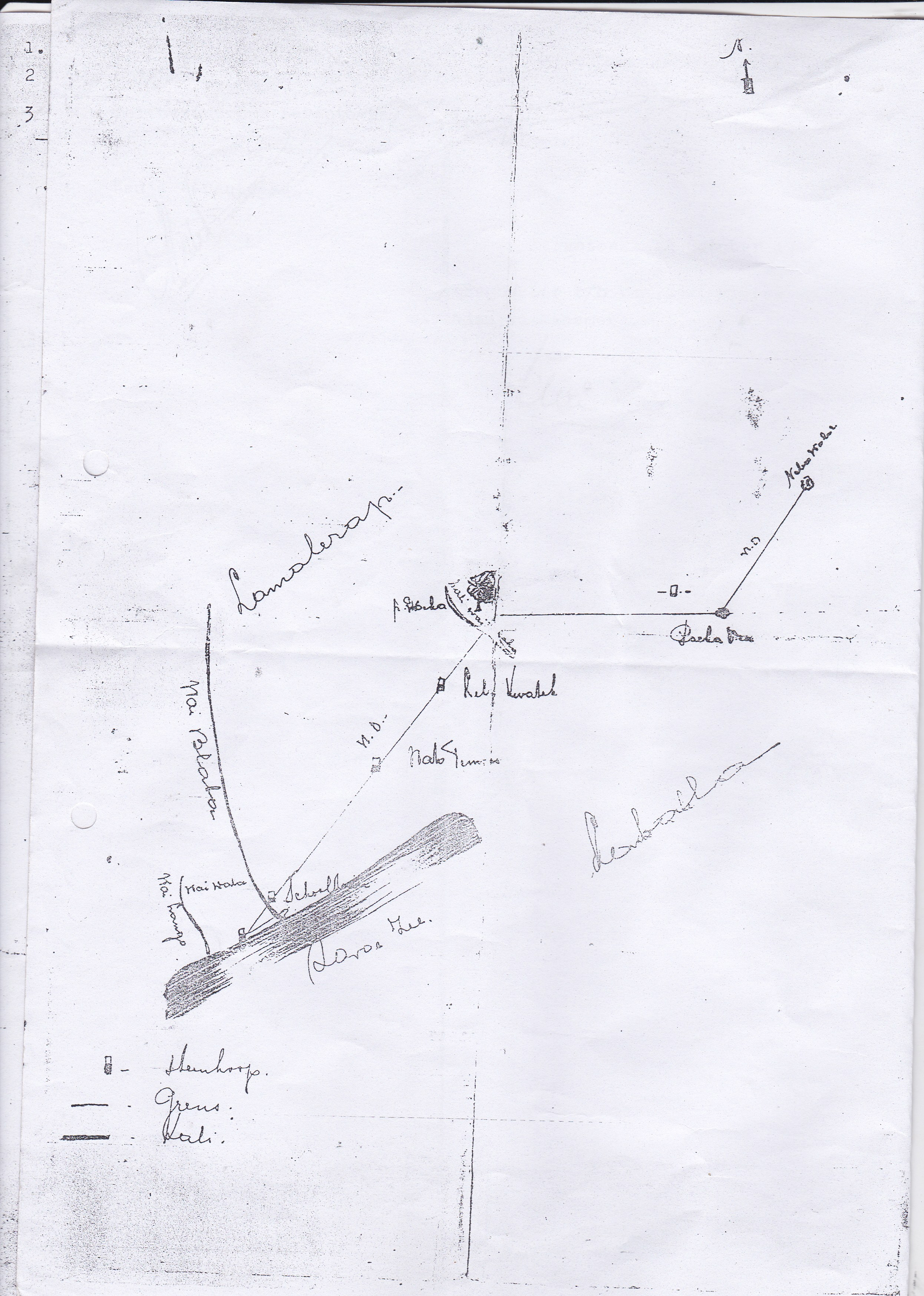 Sumber asli dari Hamente Lamalera dan menjadi dokumen resmi pemerintah Kabupaten Lembata